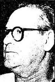 ברוך קדרי